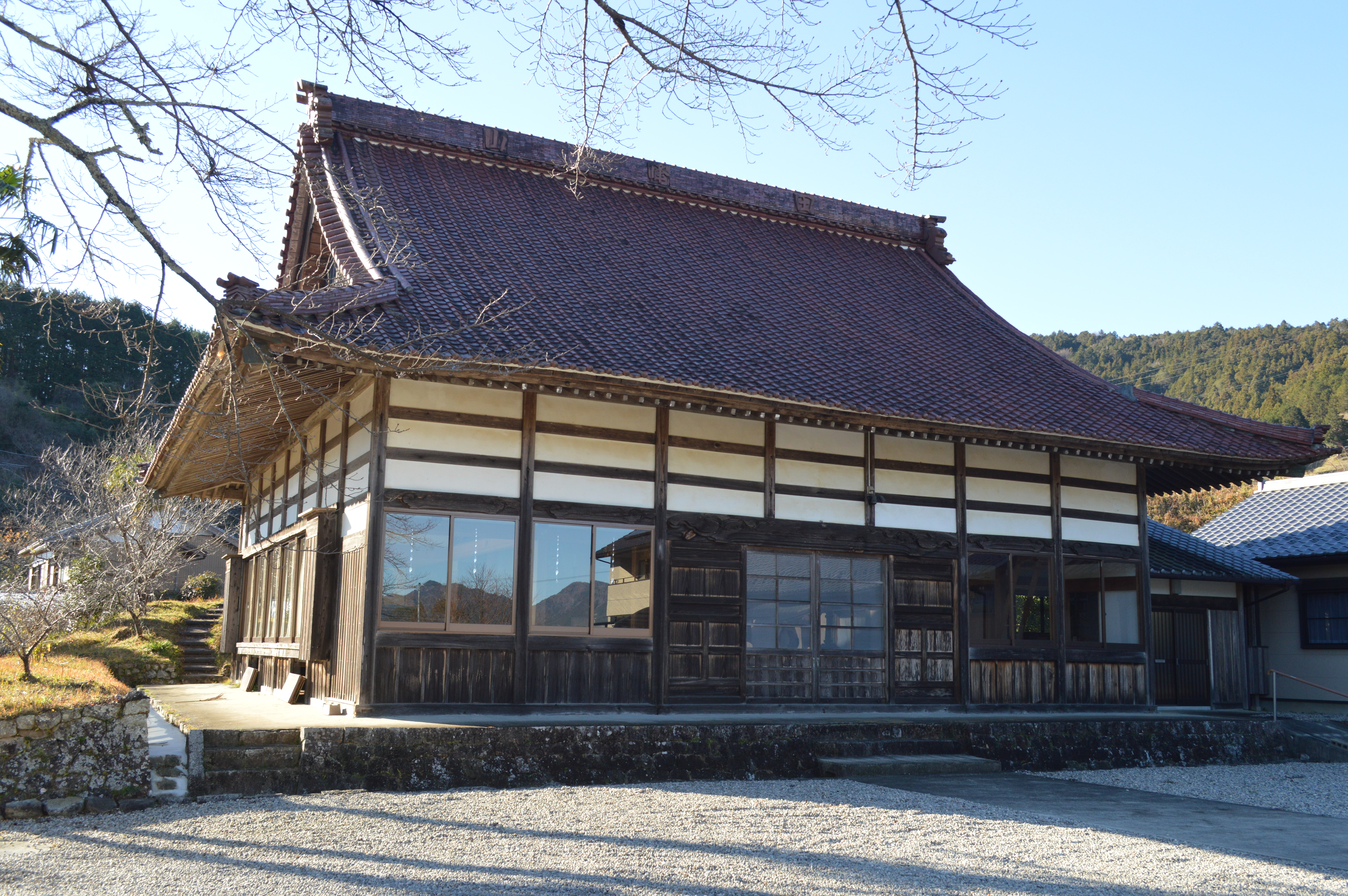 愛知県北設楽郡設楽町田峯にある日光寺。